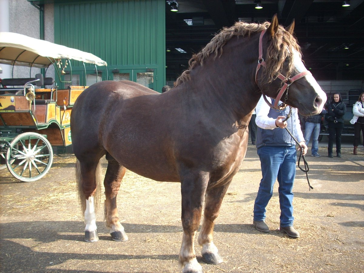 Stallone TPR, Vito - campione di razza 2008 categoria 3-5 anni